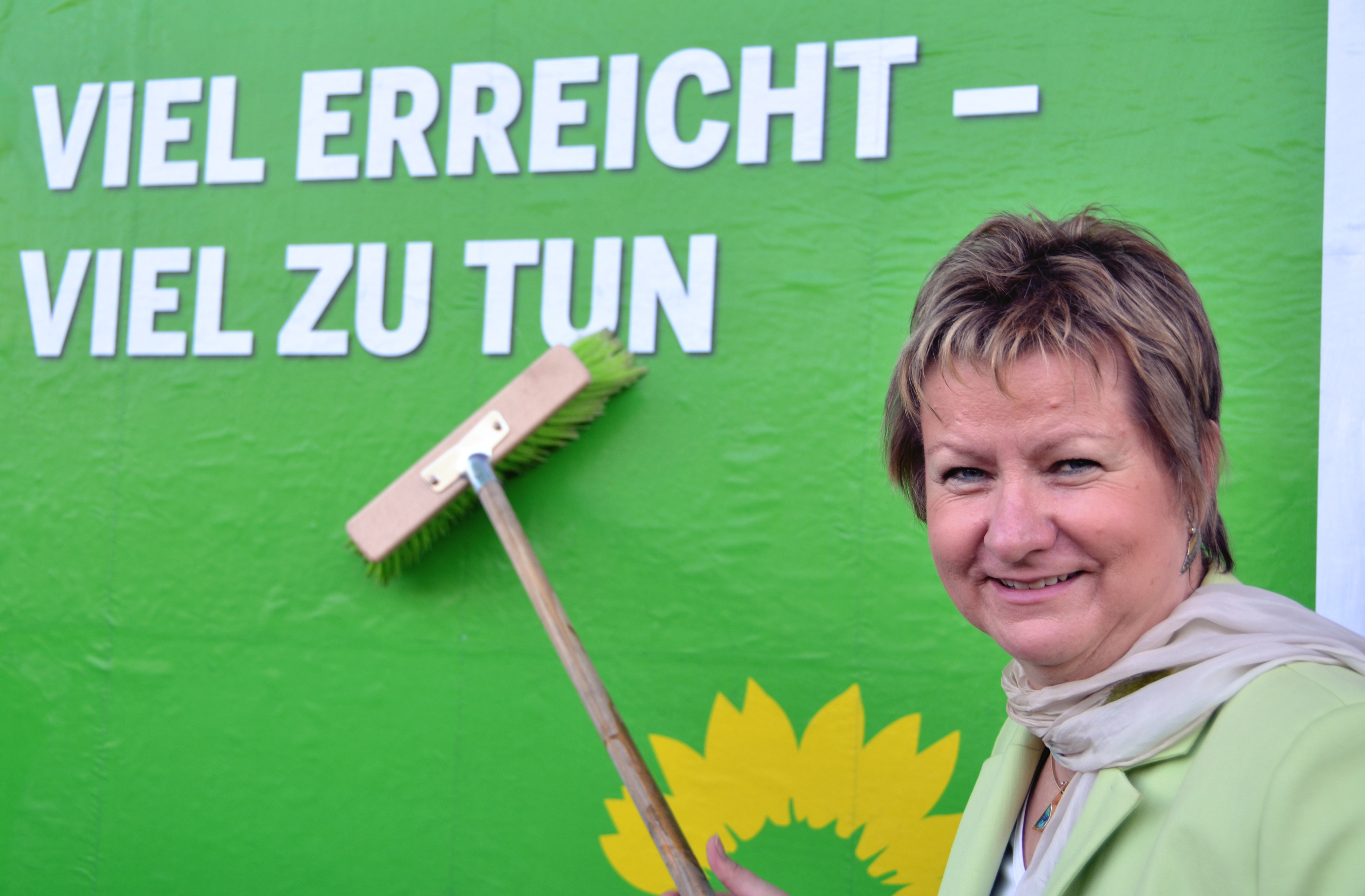 GRÜNE starten in den NRW-Wahlkampf mit Sylvia Löhrmann